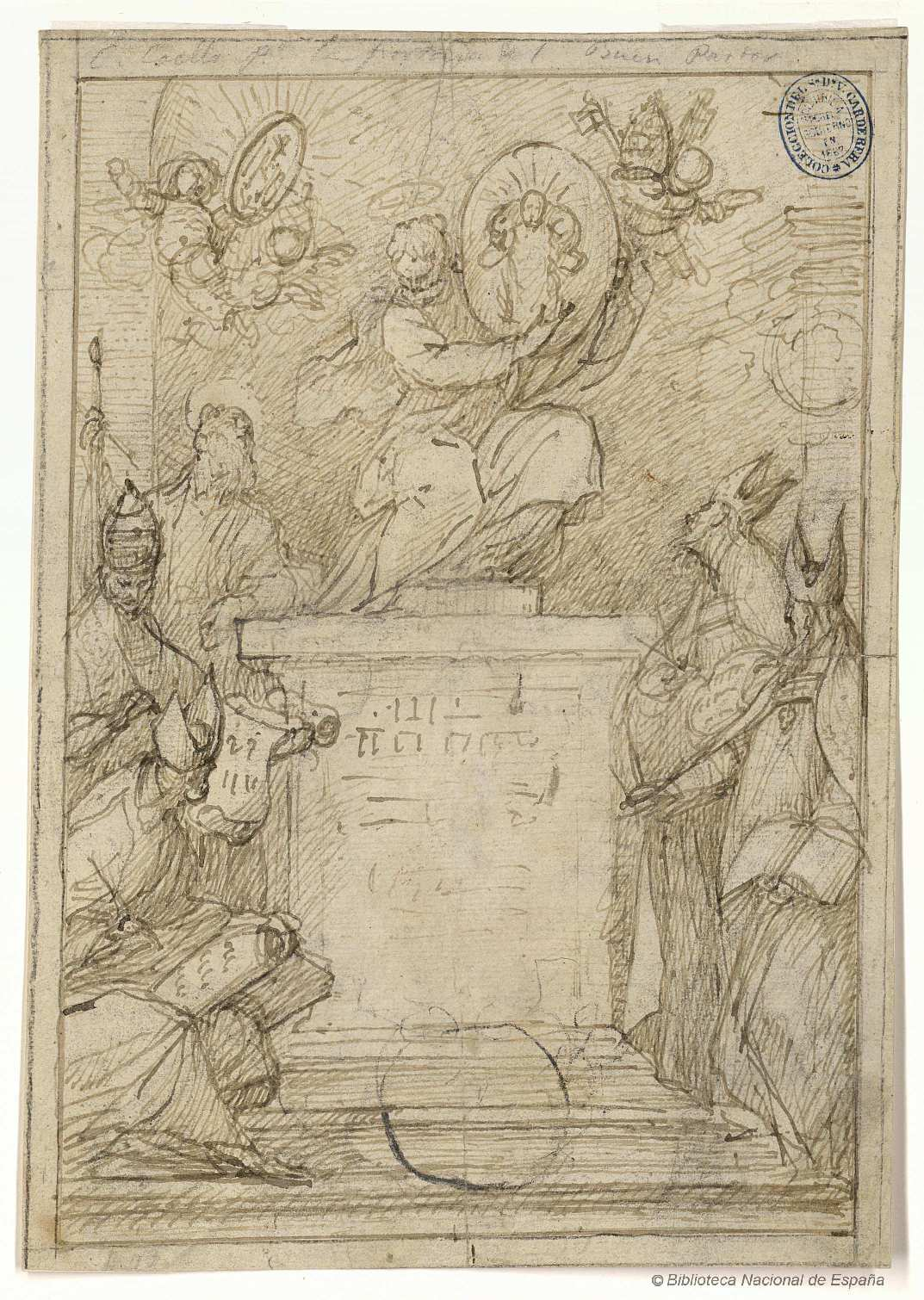 Dibujo a pluma y tinta parda para la portada del libro Idea de el Buen Pastor..., por el padre Francisco Núñez de Cepeda, Biblioteca Nacional de España.